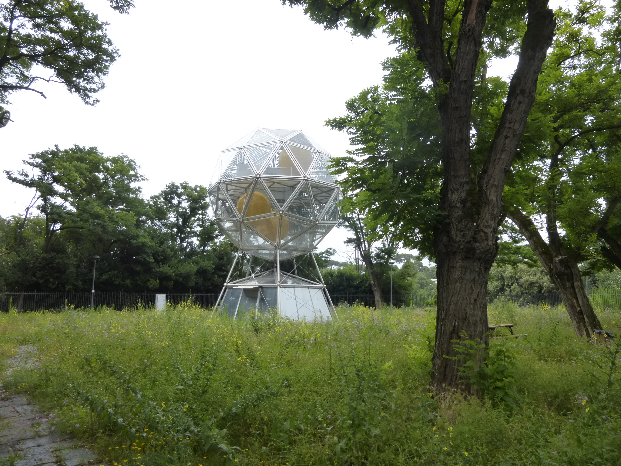 Roma, via Gramsci (Valle Giulia): Diamante, la nuova centralina solare ENEL